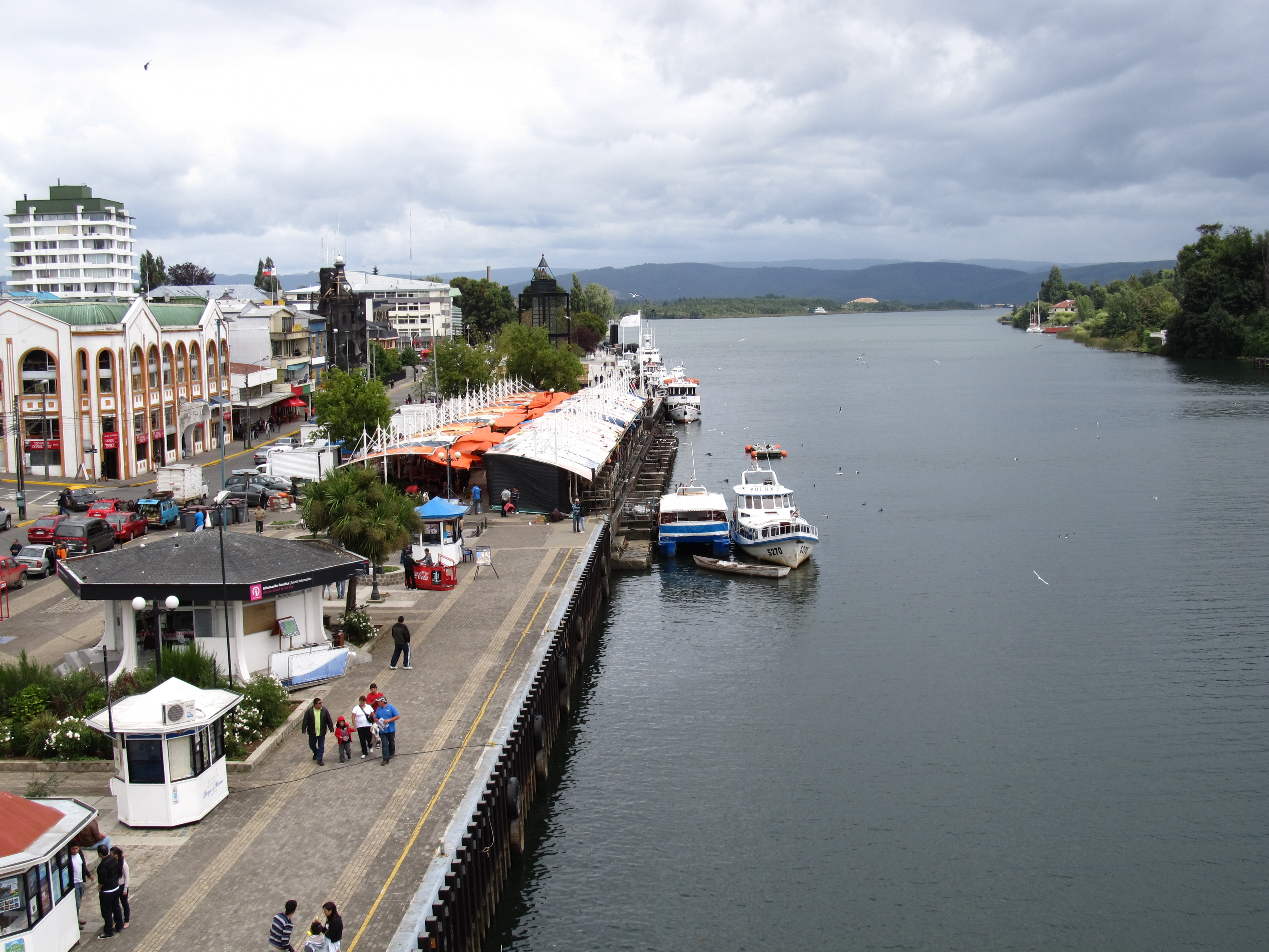 Feria Fluvial de Valdivia This is a photo of a national monument in Chile: 2132